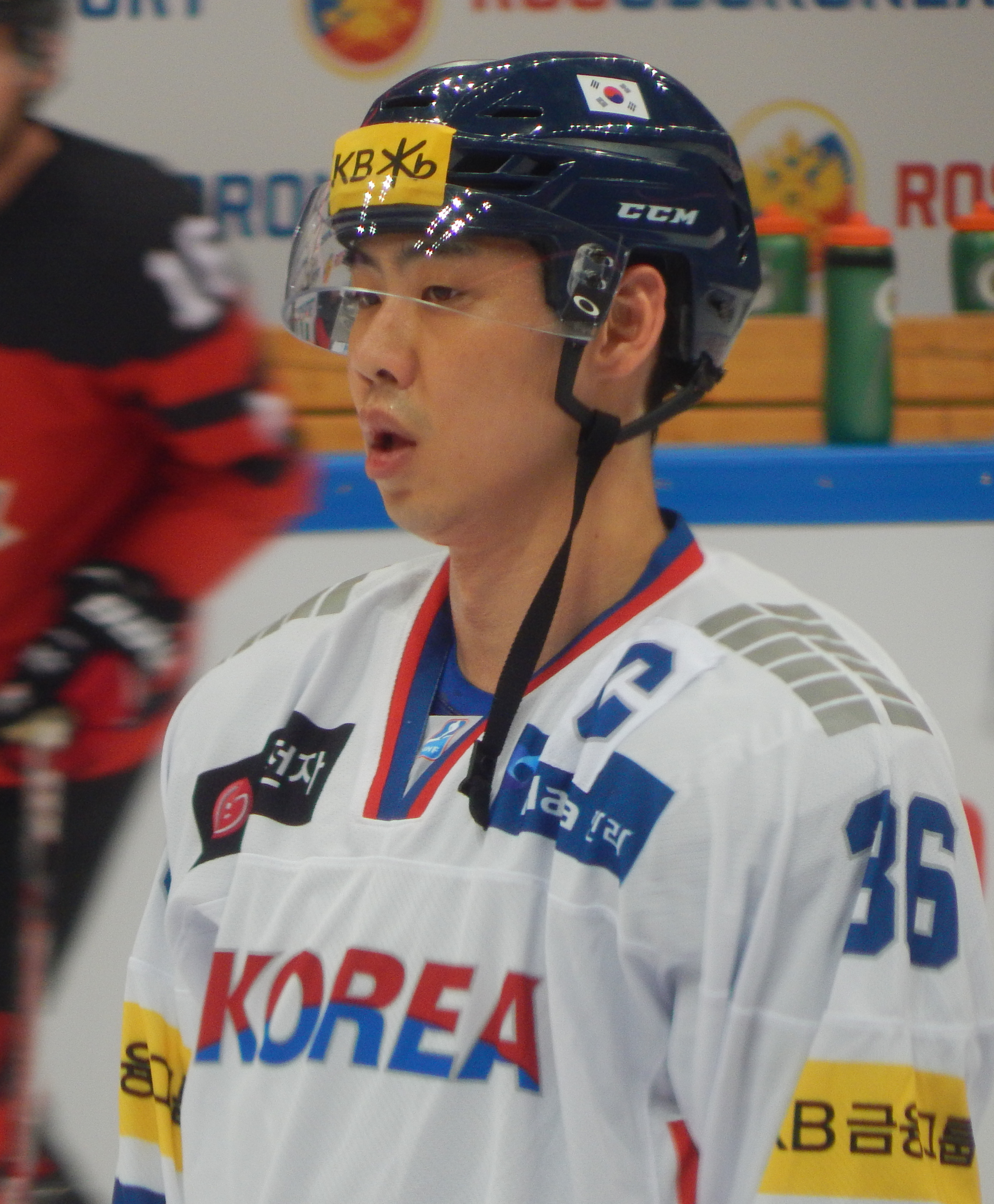 Кубок Первого Канала 2017, матч Канада - Южная Корея (13 декабря 2017) #36 PARK,Woo Sang (KOR)